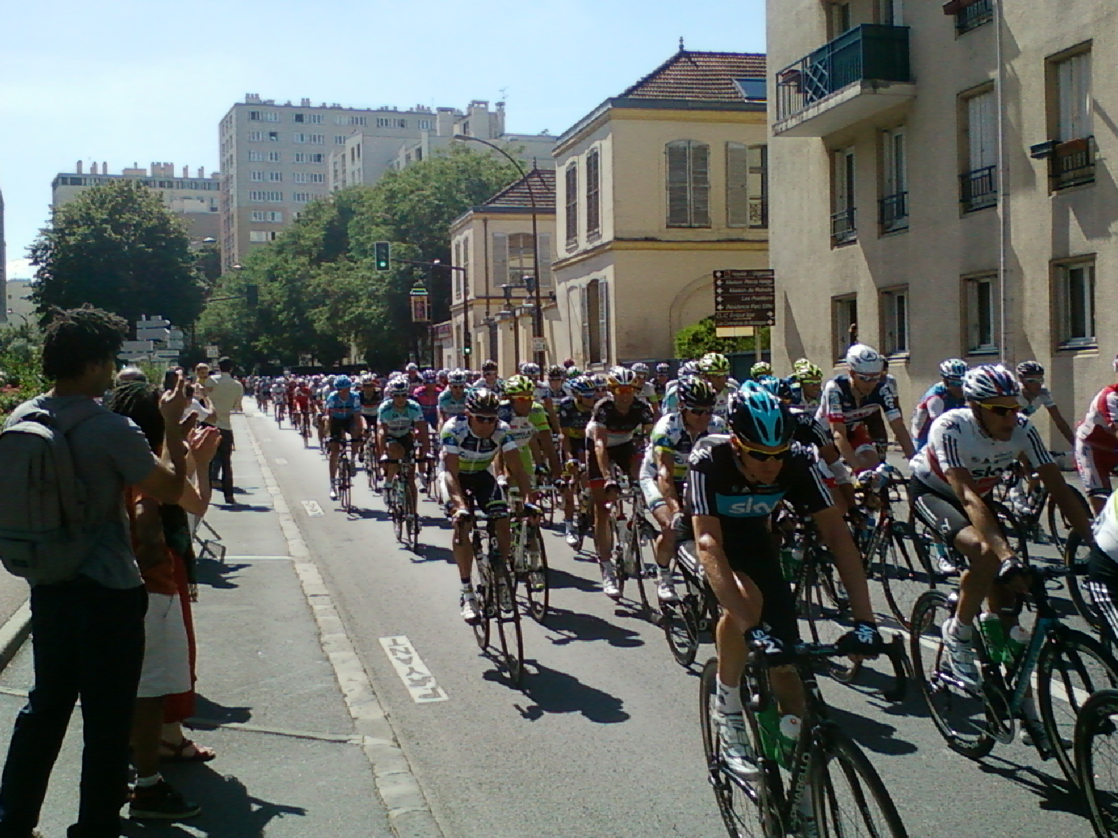 Passage du tour de France dans la Grande rue à Sèvres (Hauts-de-Seine) lors du la 20ème étape du Tour de France 2012 le 22 juillet 2012.